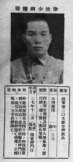 中文（台灣）: 抗戰軍人忠烈錄第一輯中的烈士遺像